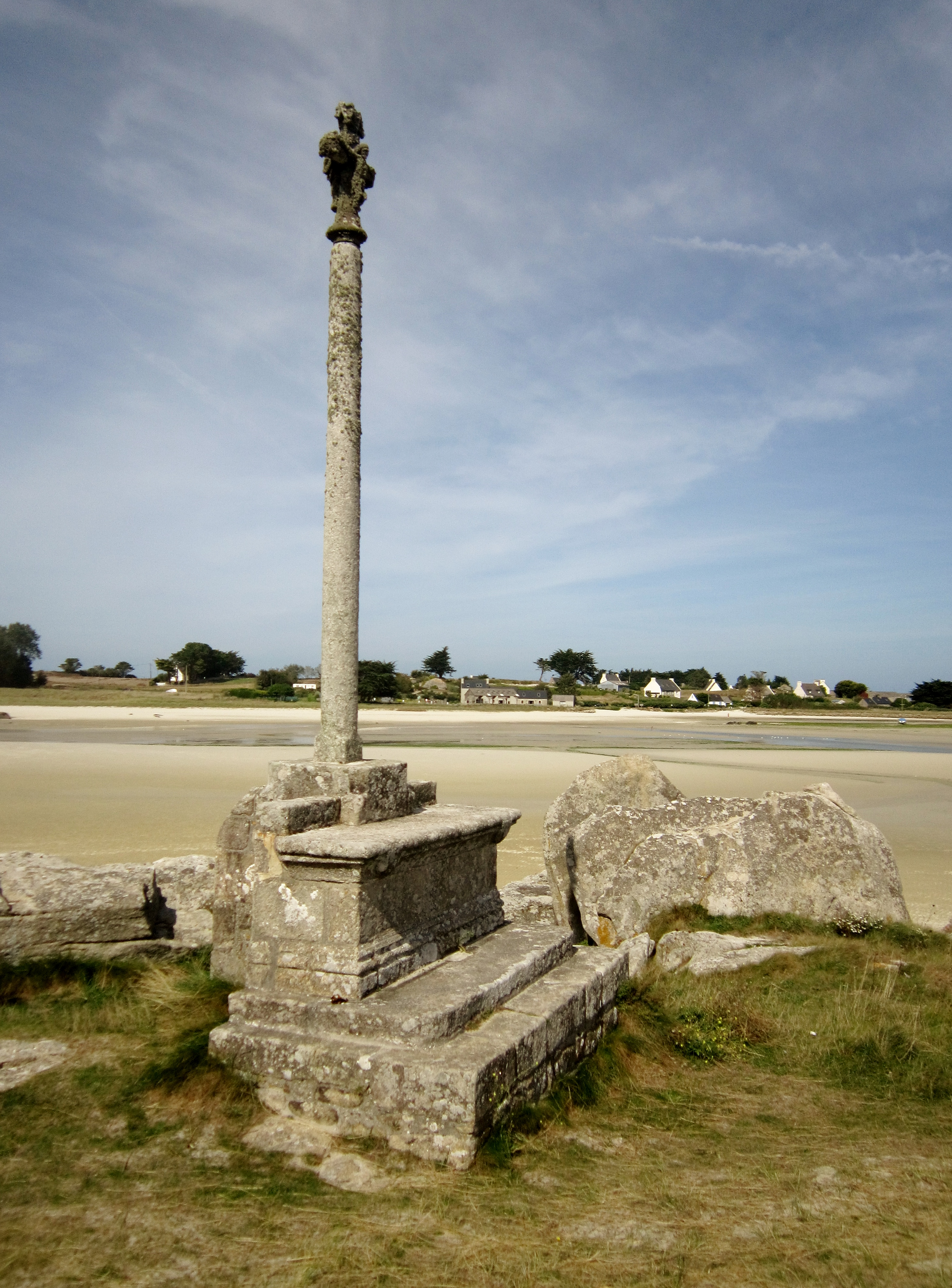 Guissény : la croix de la grève, située près du Grand Rocher (rive sud de la baie de Tréssény) ; dite aussi Croas-an-Aot, (car elle était initialement à Keriber), Elle date du XVe siècle, mais porte comme inscriptions "MISSION 1863" et "JUBILE 1868", celles-ci datant de son transfert.